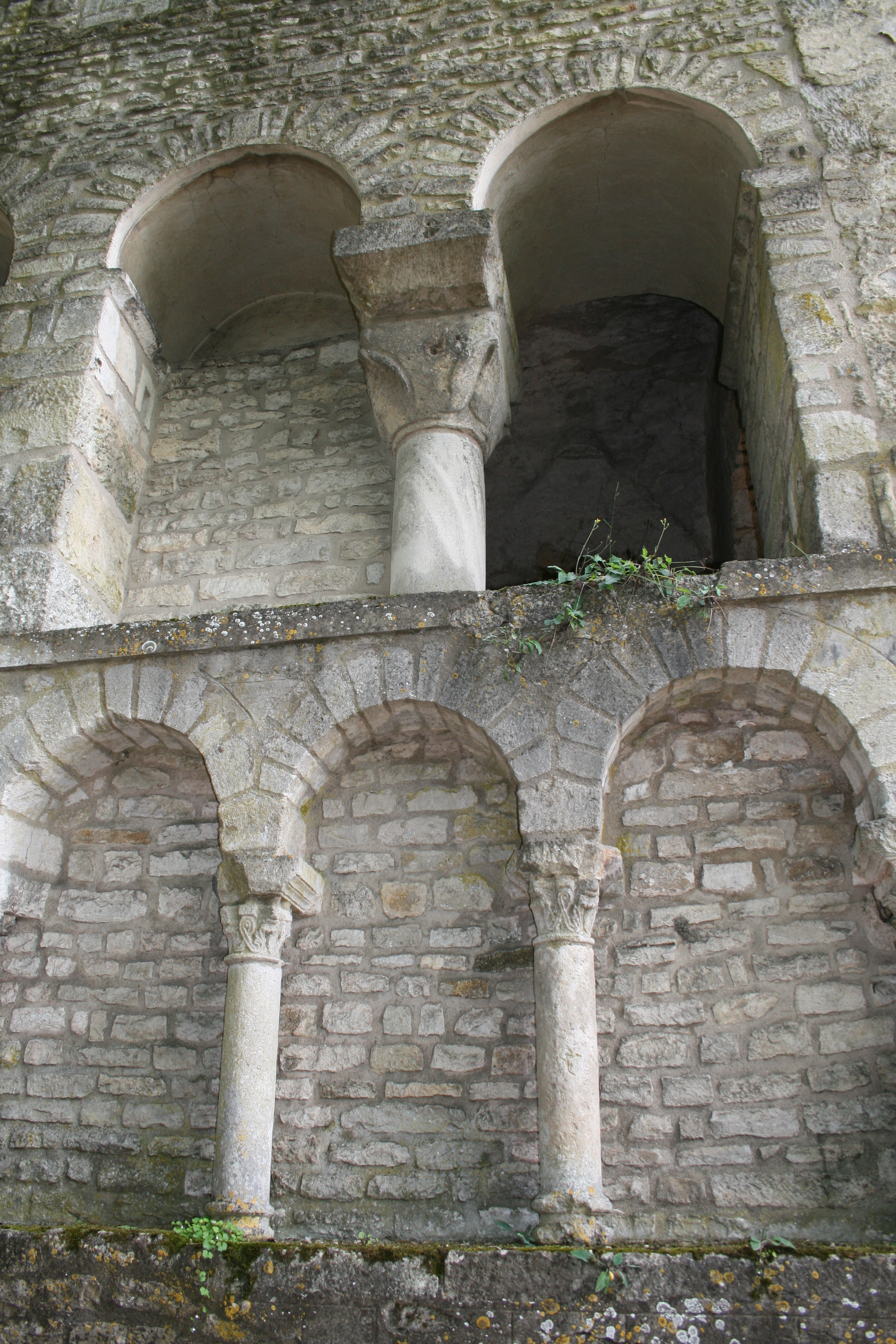 Flavigny-sur-Ozerain ancienne abbaye élévation des cryptes arcades murées